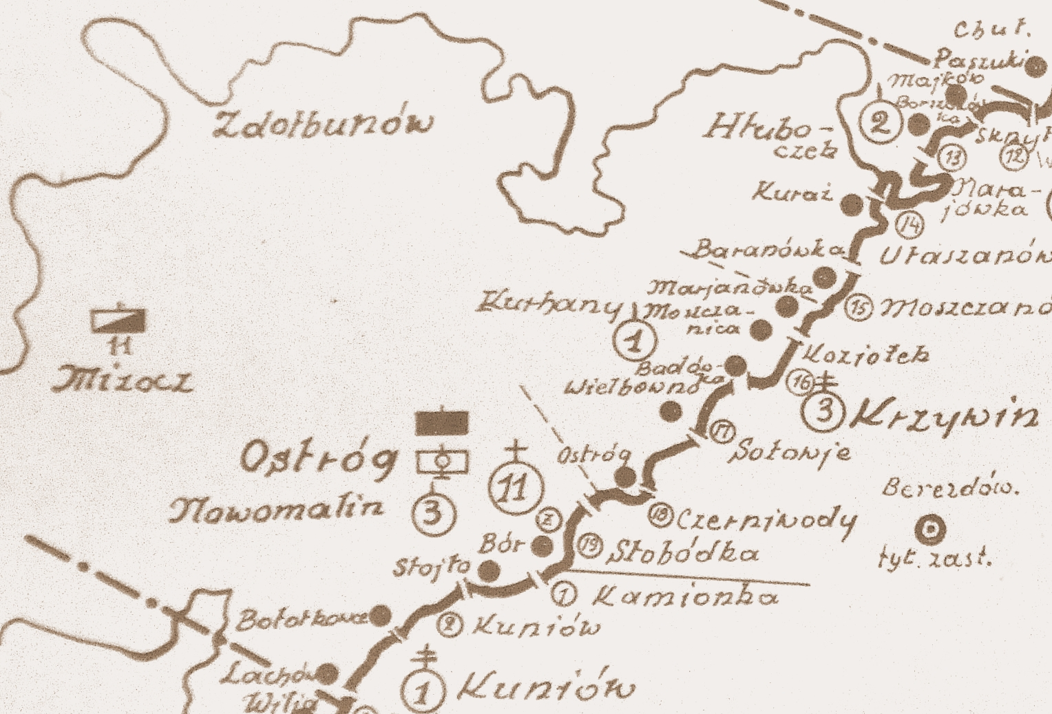 Szkic rozmieszczenia batalionu KOP Ostróg w 1931